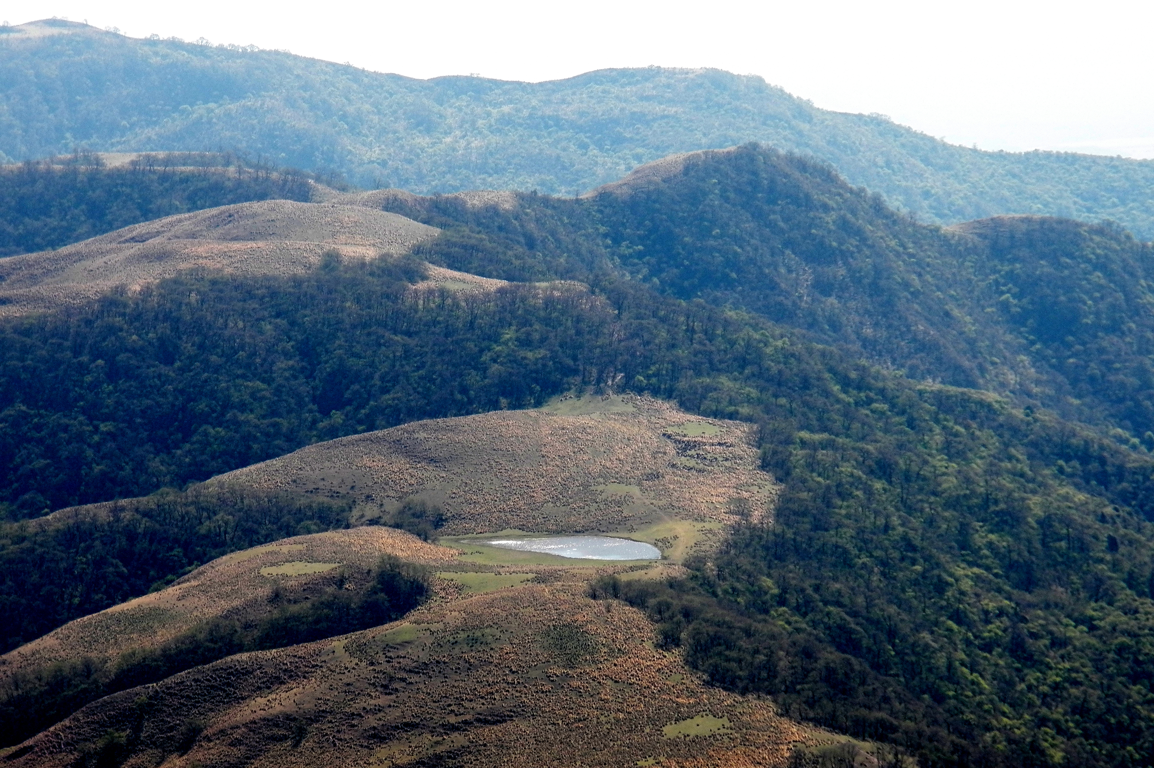 Tucumán es una de las provincias del norte con mejor terreno para el montañista y senderista. La vista es incomparable, el clima es el ideal.